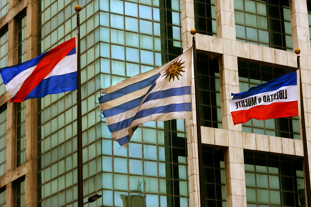 Uruguay flags